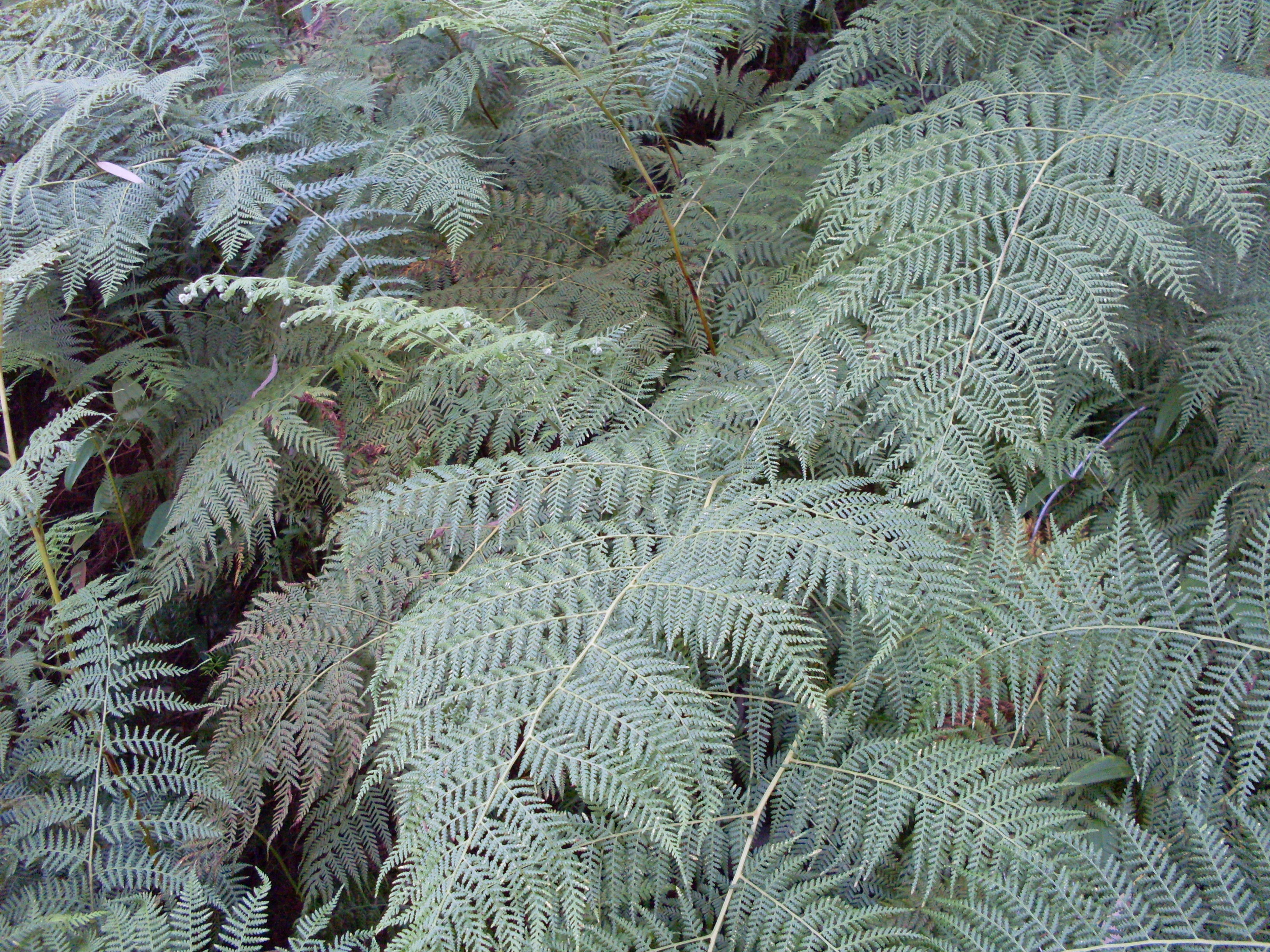 Bracken (Pteridium esculentum). Paruna Reserve, Como NSW Australia, December 2008.